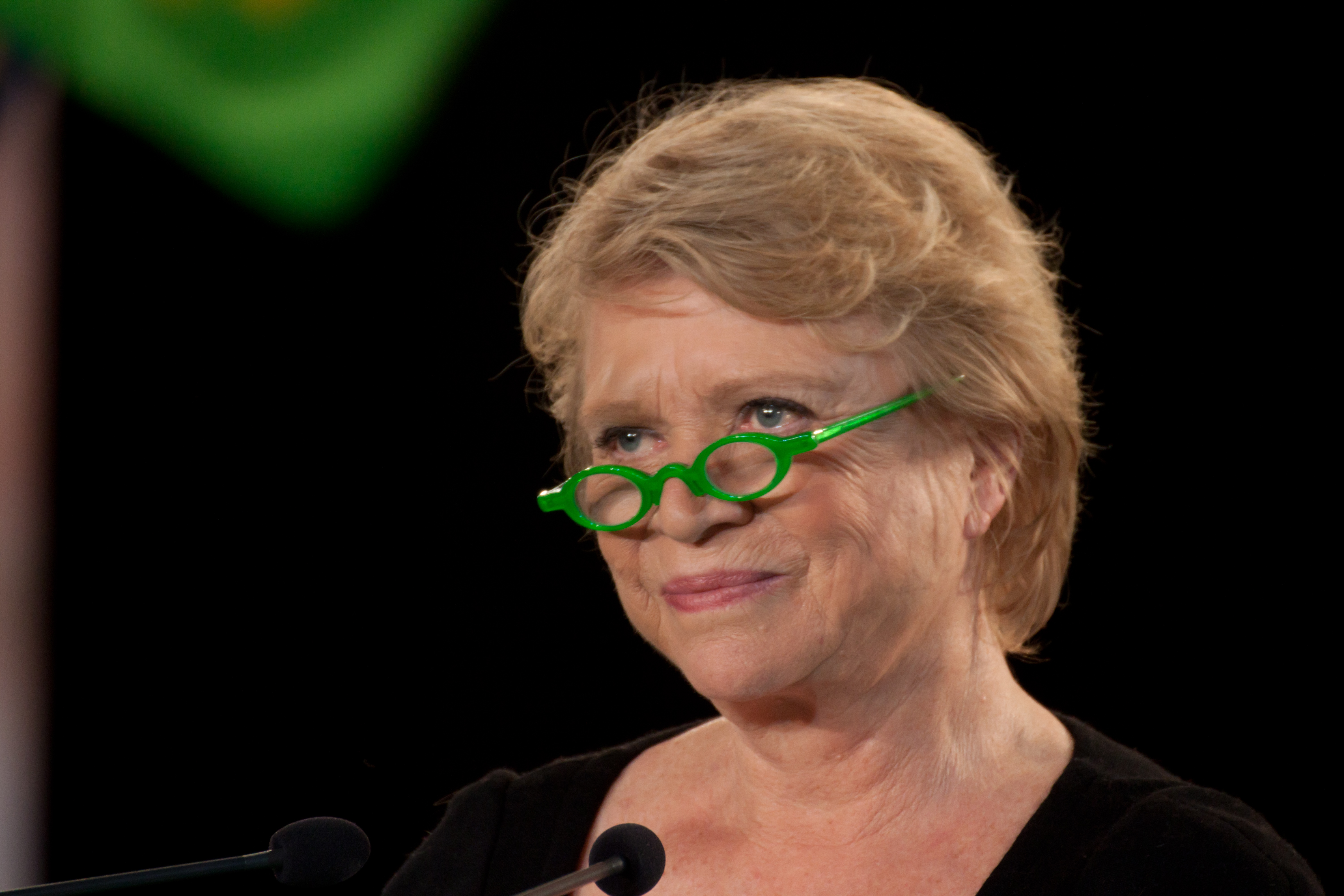 Eva Joly lors de son meeting pour l'élection présidentielle de 2012 à Grenoble